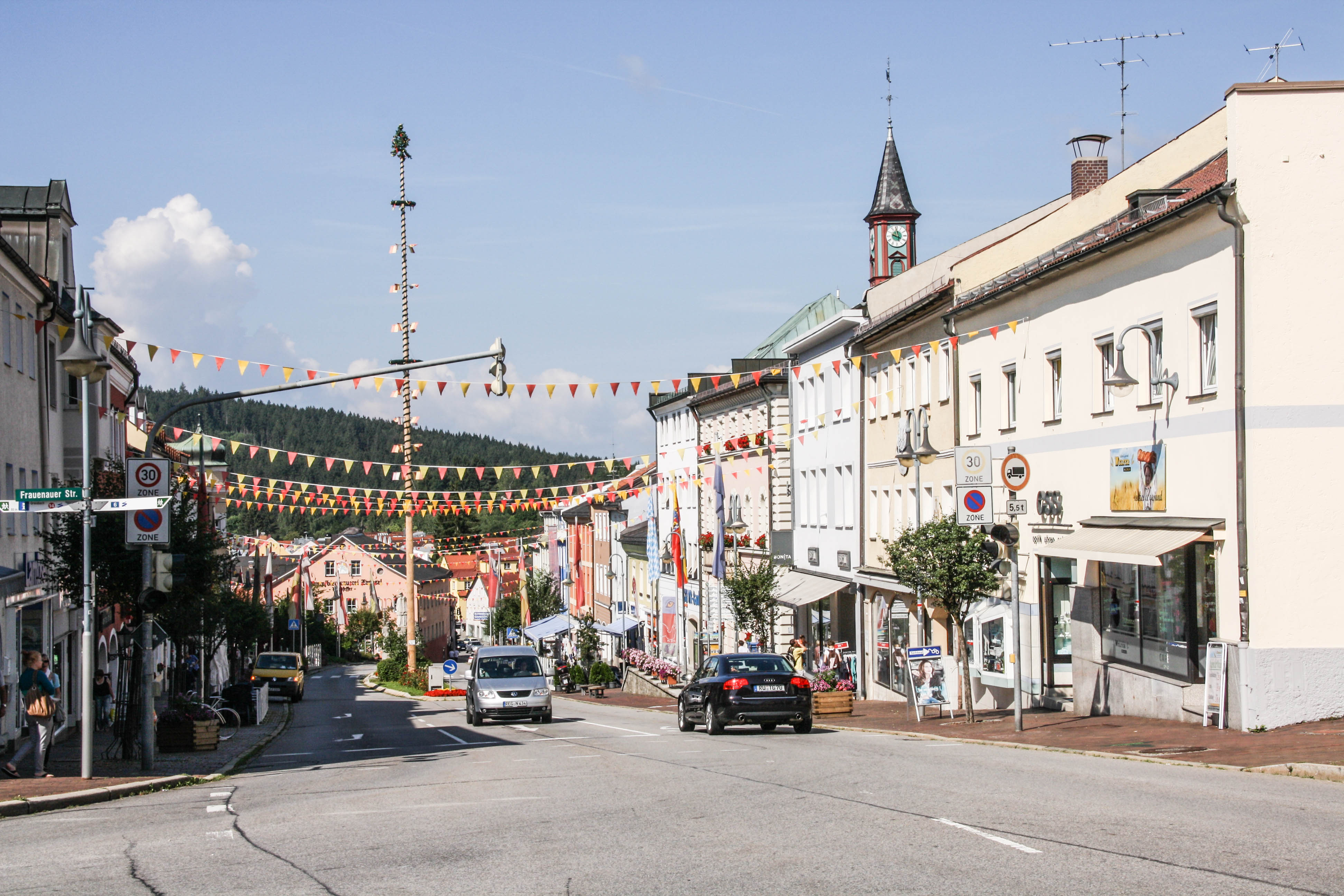 Der Stadtplatz Zwiesels (Hang abwärts)